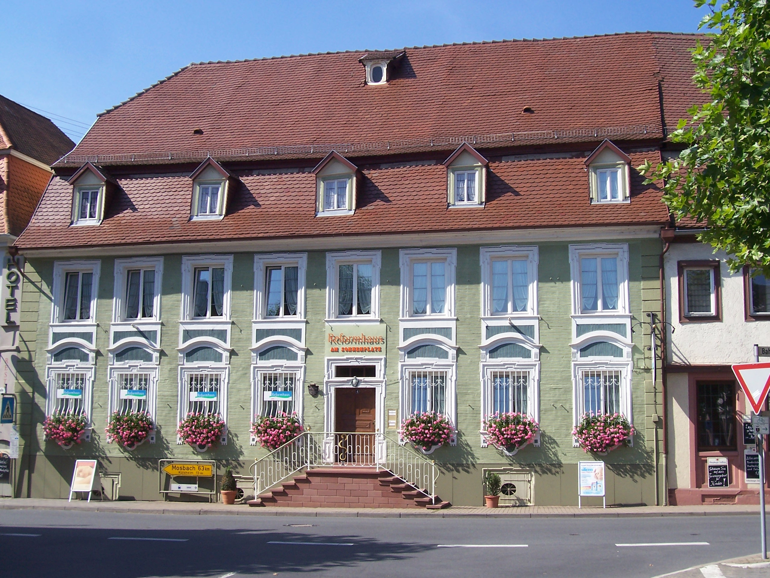 Sonnenplatz-Apotheke in Tauberbischofsheim (Am Sonnenplatz 4), erbaut 1720